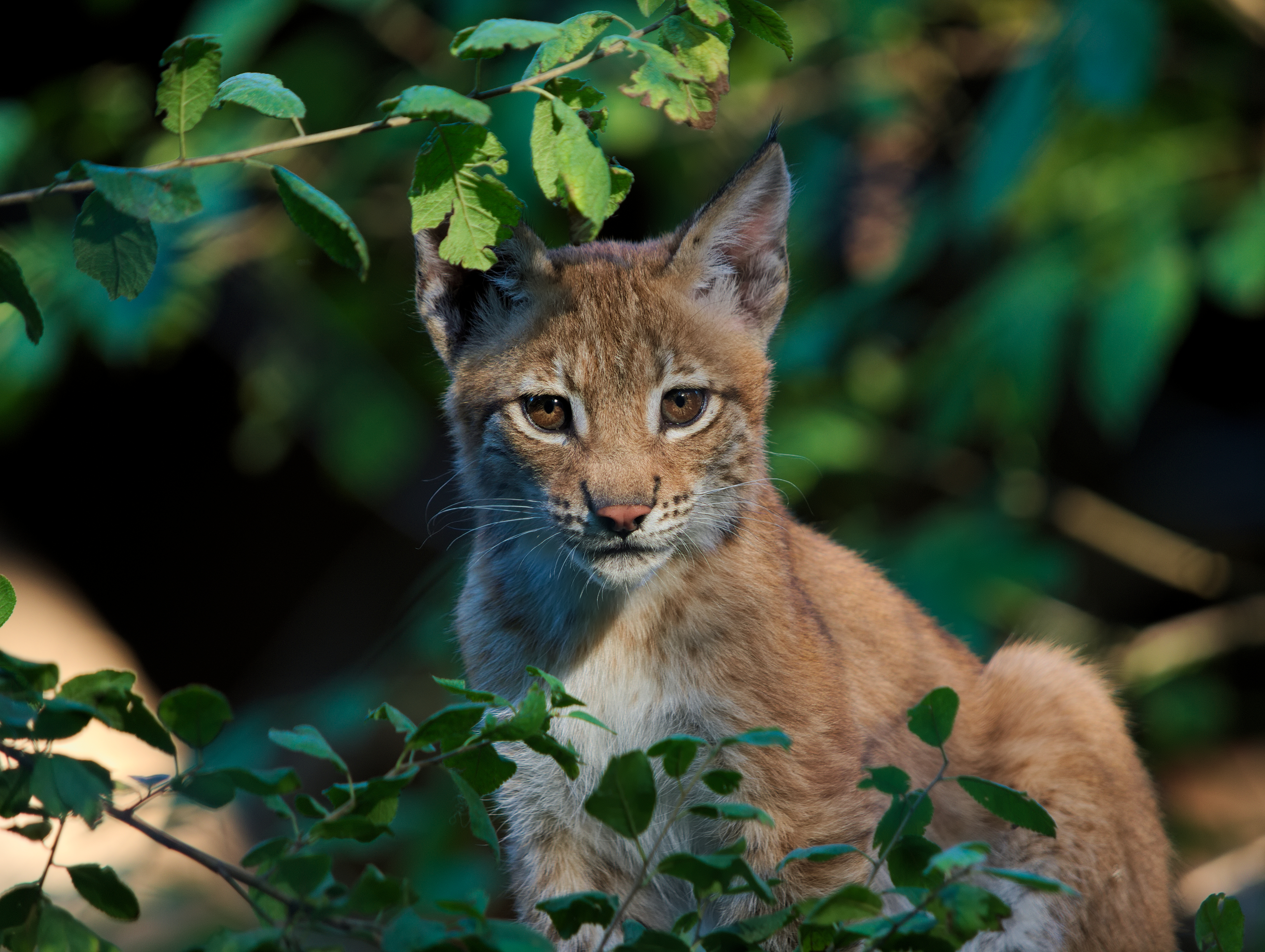 Eurasian lynx (Lynx lynx)